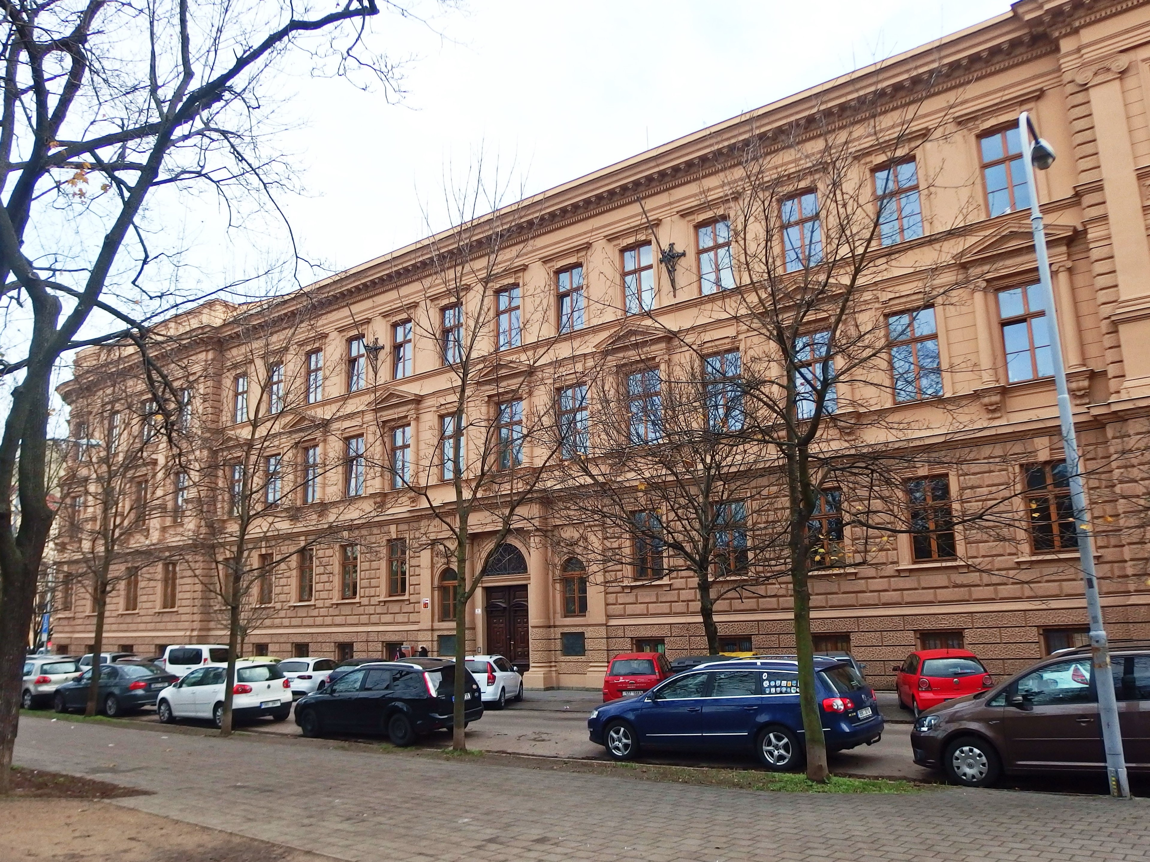 Střední průmyslová škola stavební Brno